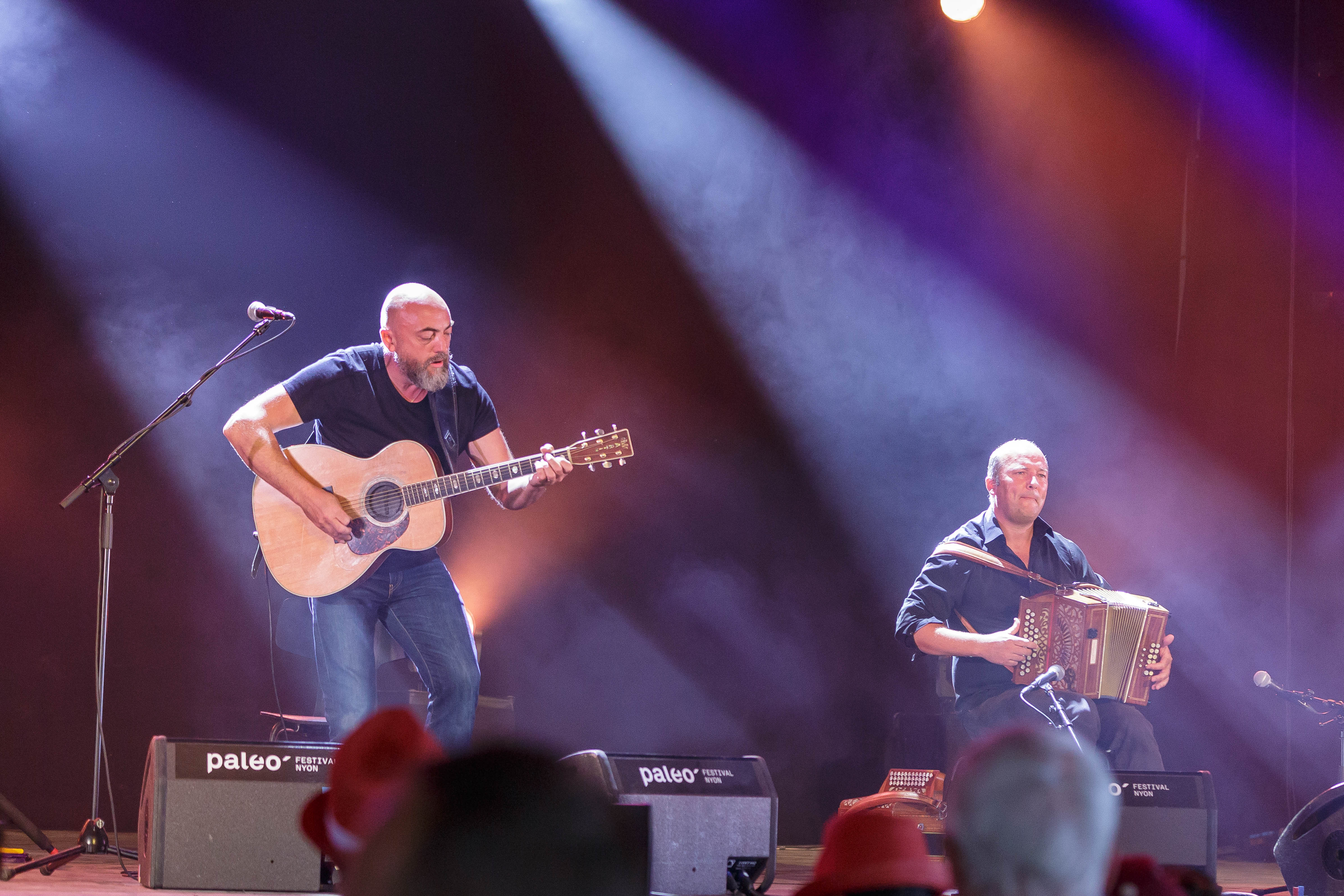 Paléo Festival Nyon, édition 2016, 19-24 juillet 2016. Jeudi 21: Les Frères Guichen (folk breton, France)